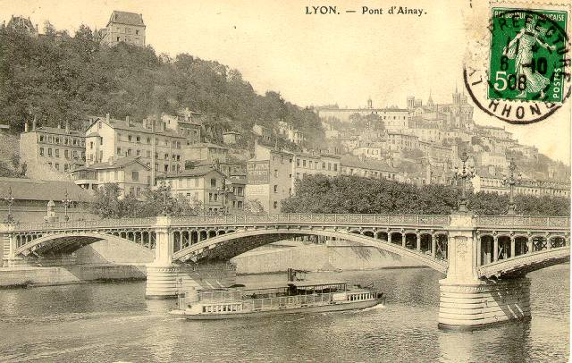 Pont d'Ainay à Lyon vers 1900